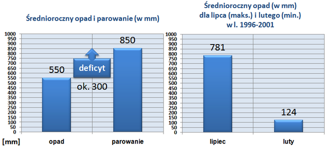 Grafika ilustrująca średnioroczny opad i parowanie dla Środy Wielkopolskiej